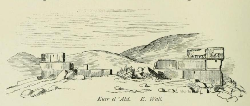 תמונות ושרטוטים מהאתר עראק אל אמיר שצילם או שרטט קלוד קונדר בסקר ארץ ישראל המזרחית בשנת 1881. שרטוט קצר אל עבד הקיר המערבי